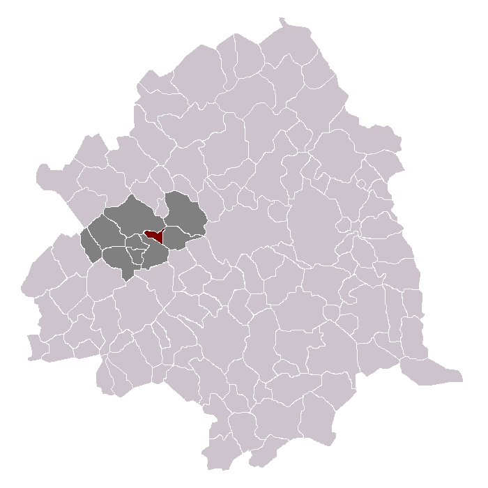 Englos dans son canton et son arrondissement